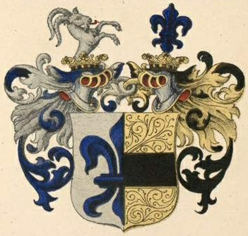 Emme suguvõsa aadlivapp